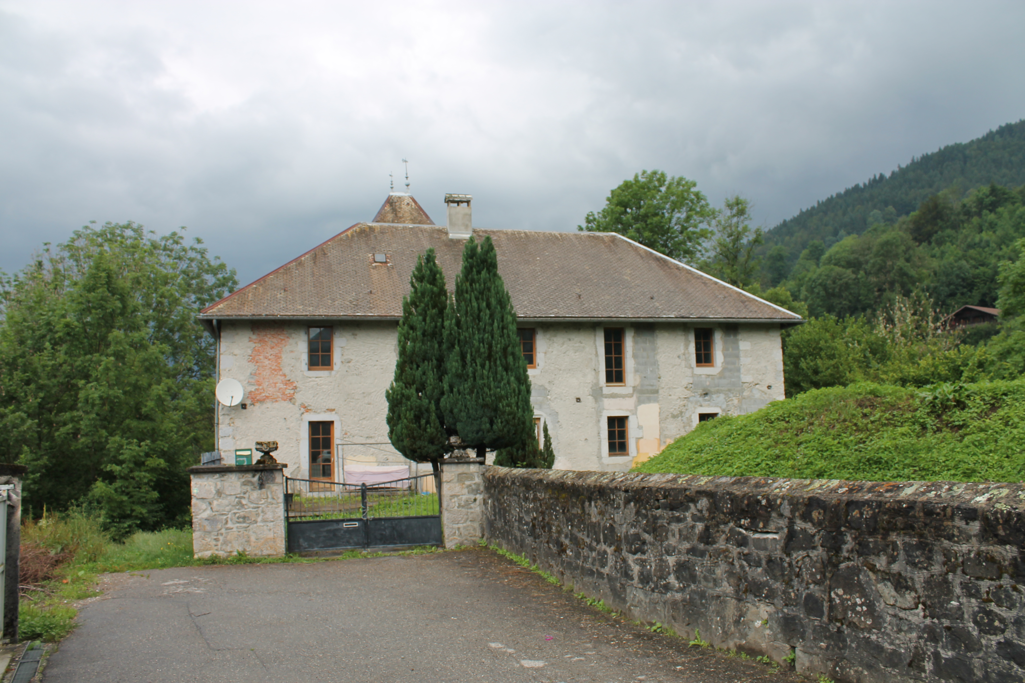 L'actuel « château des Clefs », maison bourgeoise de la fin du XIXe siècle.